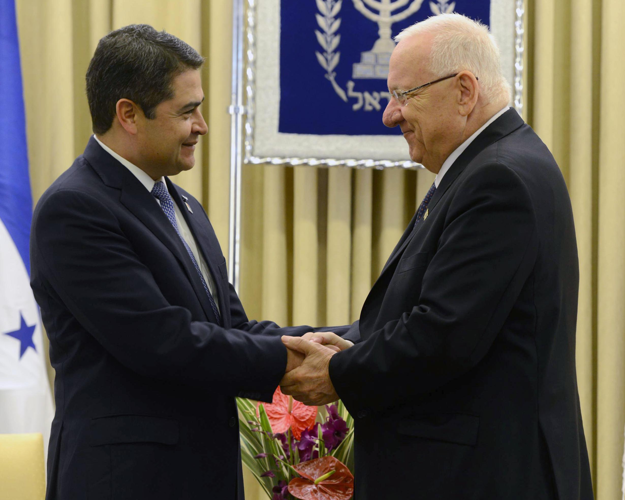 נשיא הונדורס חואן אורלנדו הרננדז בביקור בישראל בפגישה עם נשיא מדינת ישראל ראובן ריבלין